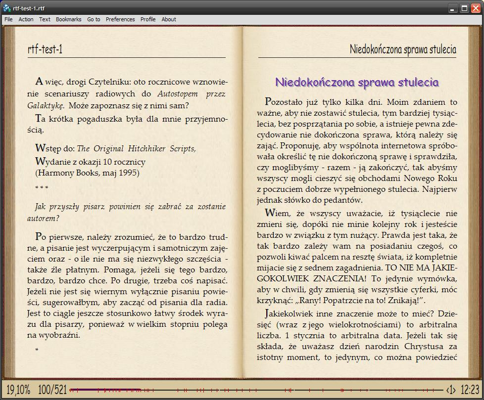 Alreader 2 pod Windows